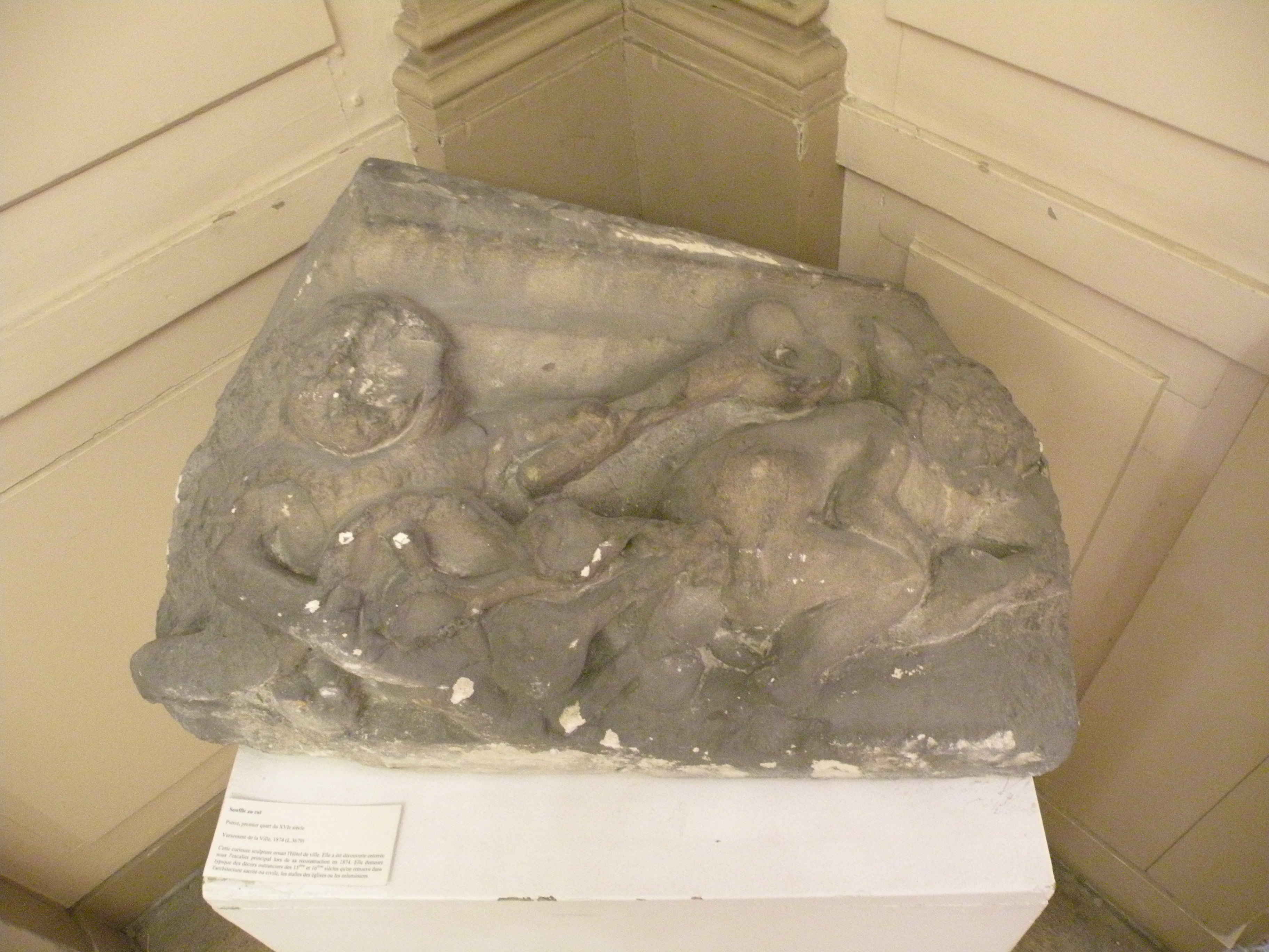 pierre sculpté "souffle au cul" Musée Antoine Vivenel